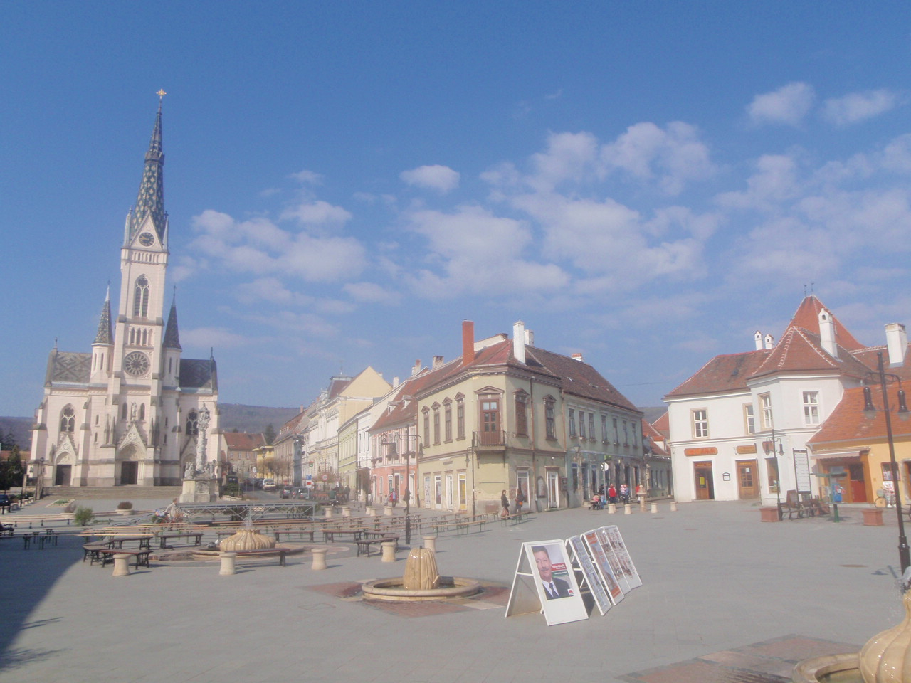 Hauptplatz von Güns